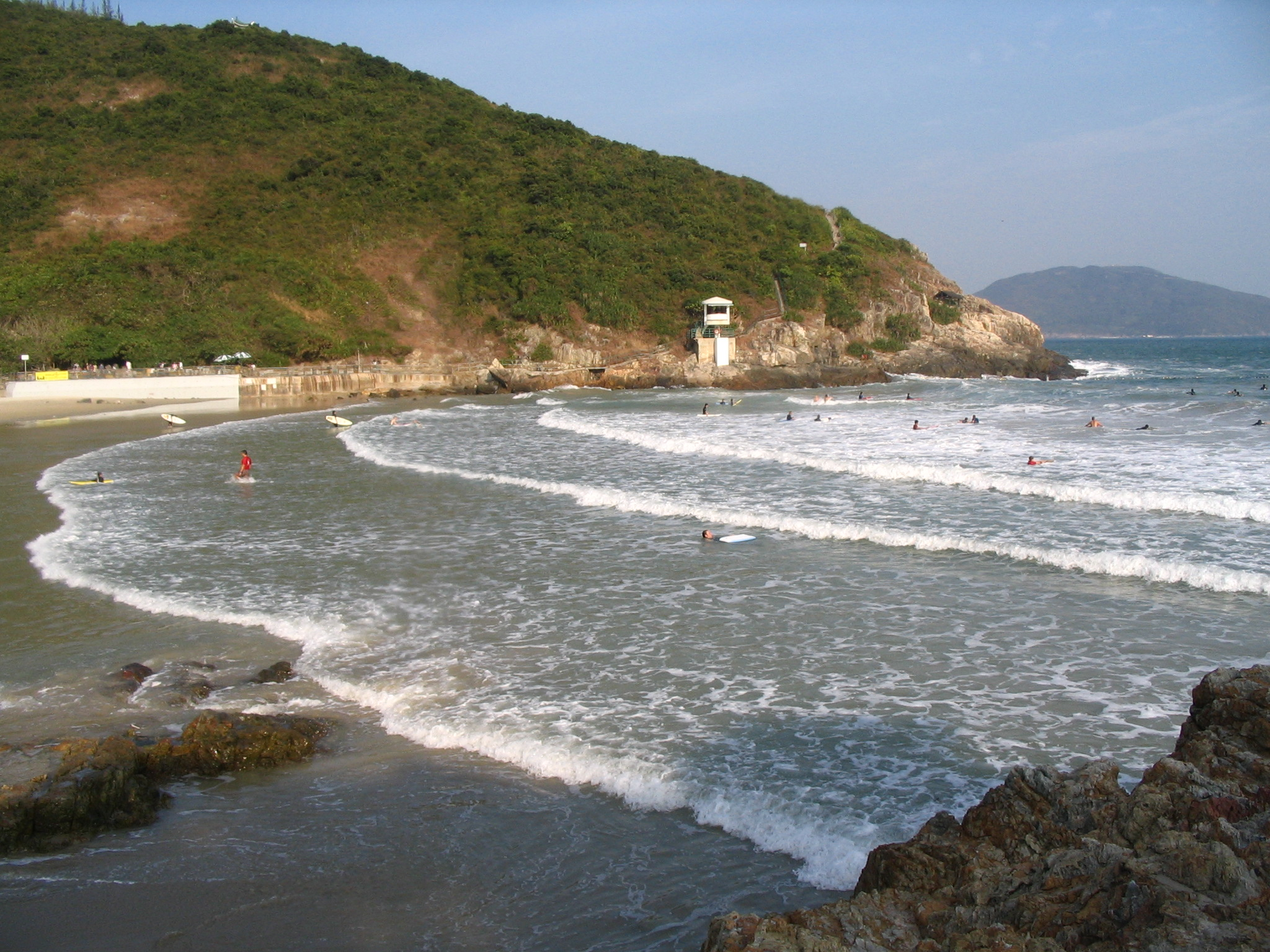 Photo of Big Wave Bay, Hong Kong Island